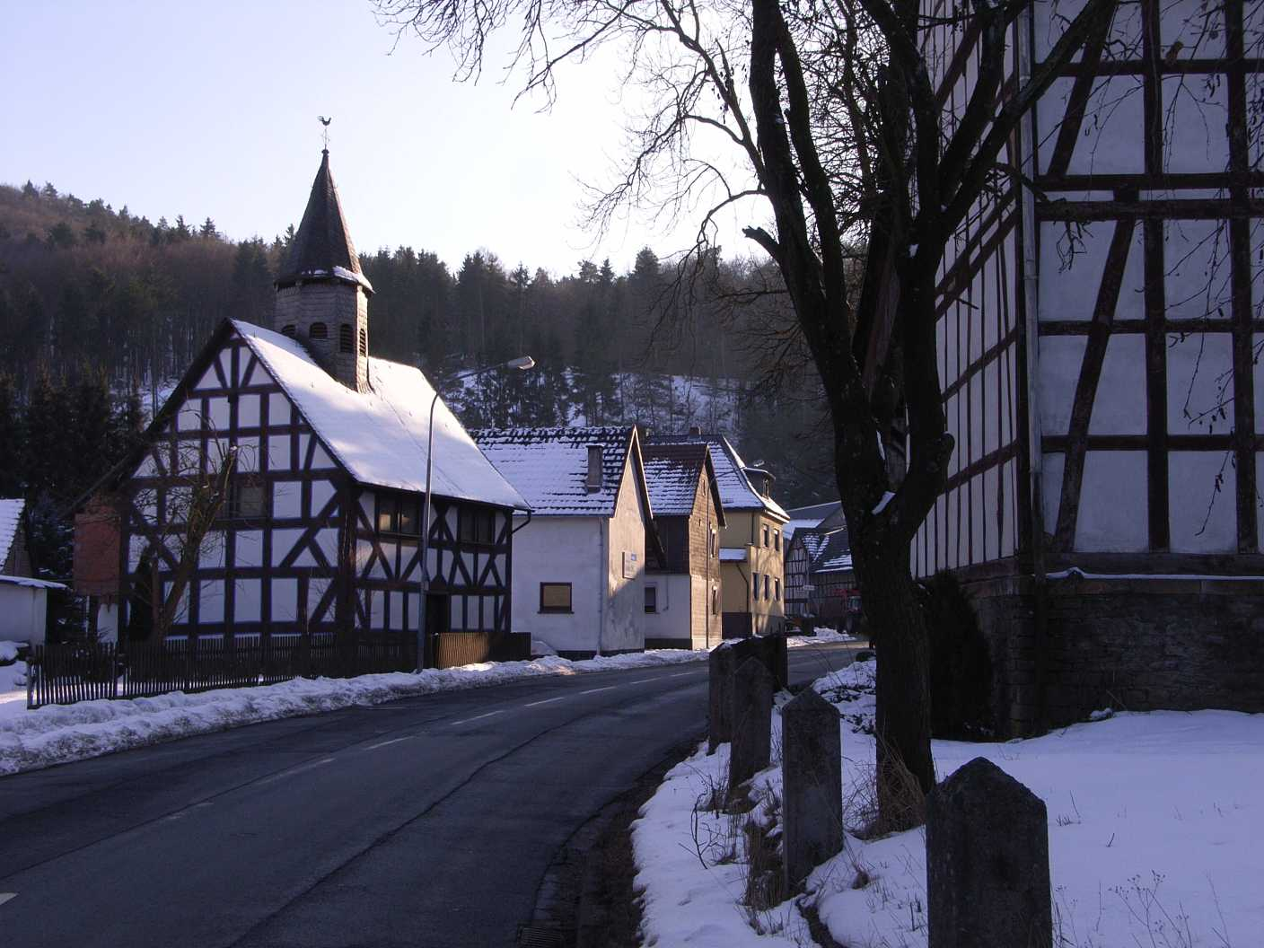 Hommertshausen (Dautphetal, Hessen) barocke Fachwerkkirche